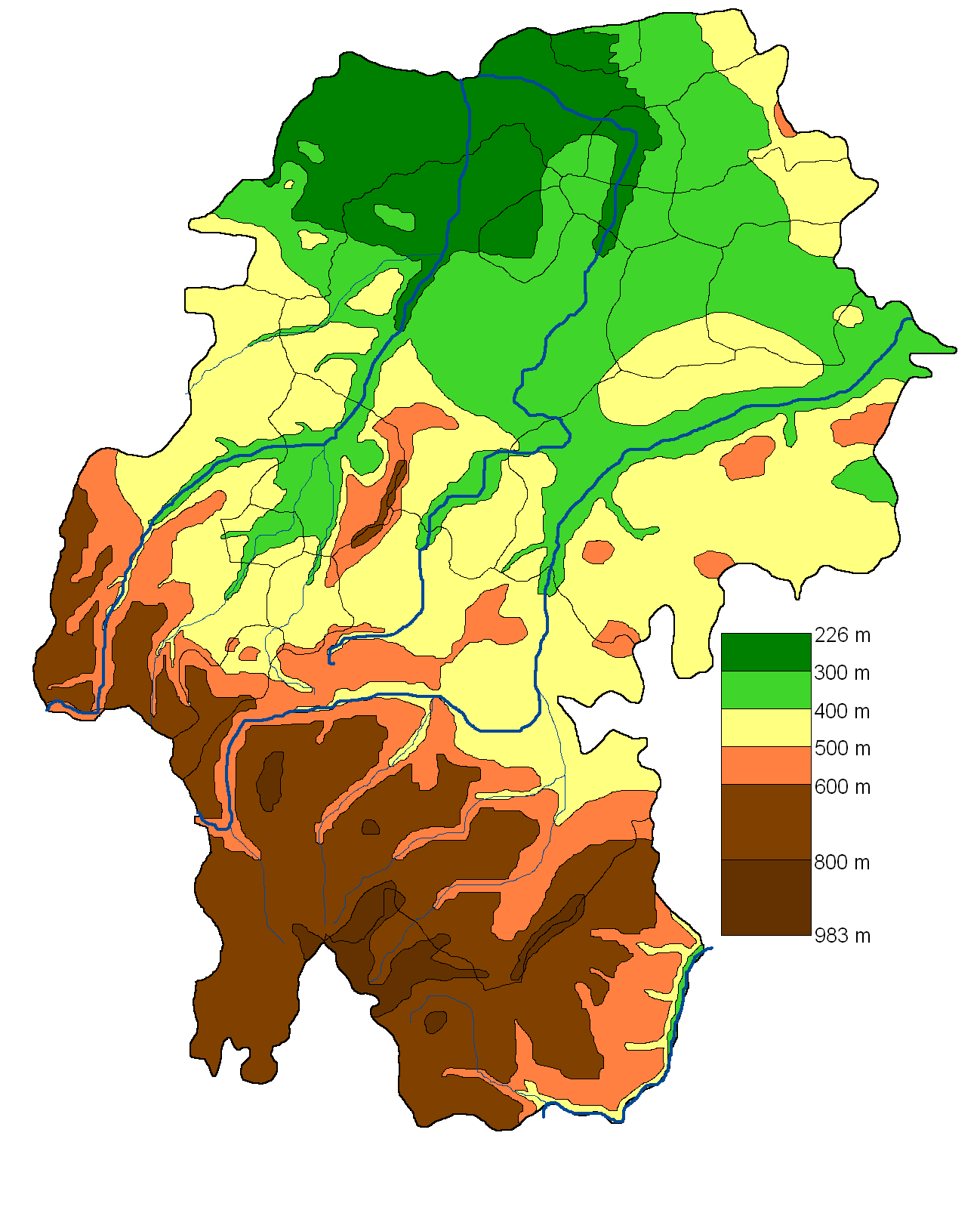 Höhenkarte des Ilm-Kreises (Thüringen)